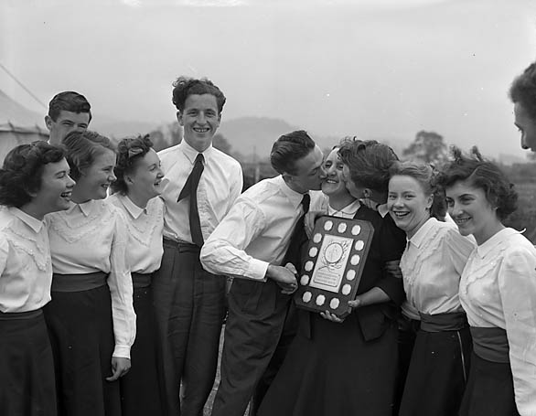 Teitl Cymraeg/Welsh title: Eisteddfod Genedlaethol yr Urdd, Y Bala 1954 Cyfrwng/Medium: Negydd ffilm / Film negative Cyfeiriad/Reference: (gch14953) Rhif cofnod / Record no.: 3370909 Rhagor o wybodaeth am gasgliad Geoff Charles yn Llyfrgell Genedlaethol Cymru More information about the Geoff Charles Collection at the National Library of Wales Mae ffotograffau Geoff Charles hefyd yn rhan o Broject Europeana Libraries Geoff Charles' photographs also form part of the Europeana Libraries Project